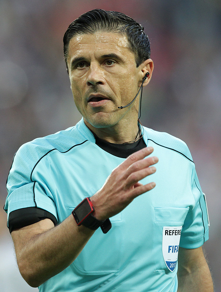 Чили - Германия